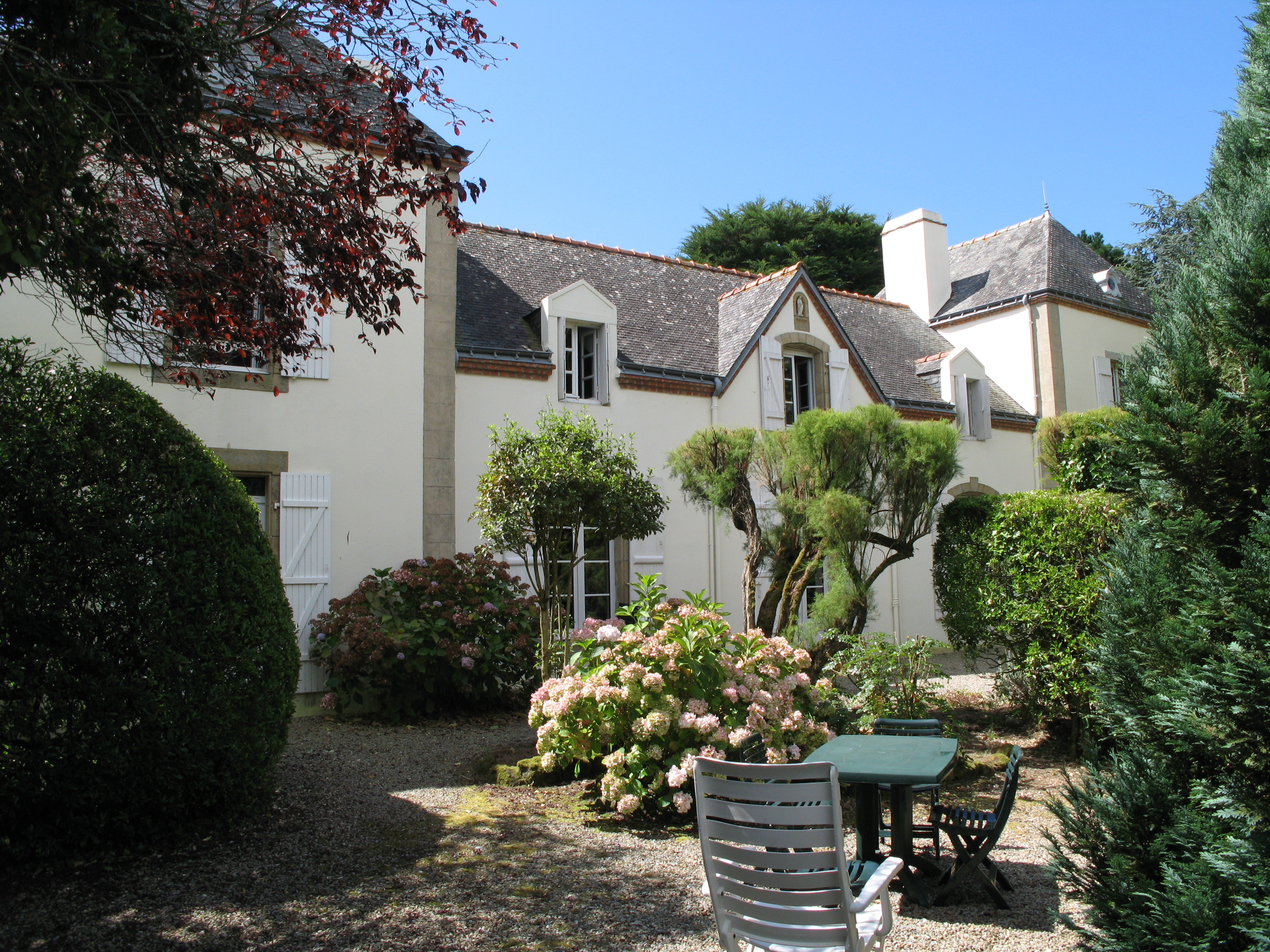 Kermoareb at summer 2007